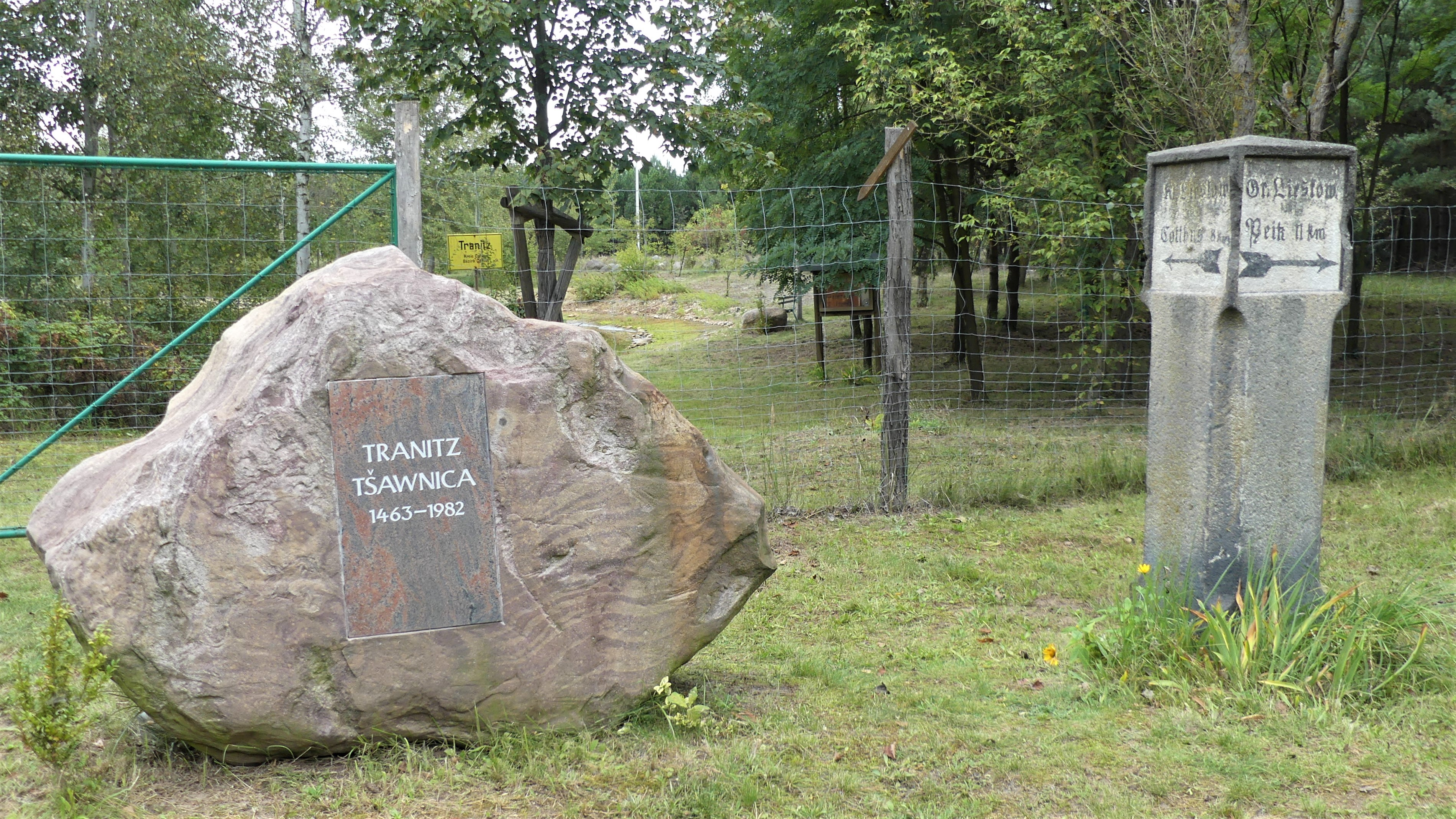 Gedenkstein für des abgebaggerte Dorf Tranitz im Bereich des Tagebaus Cottbus-Nord.